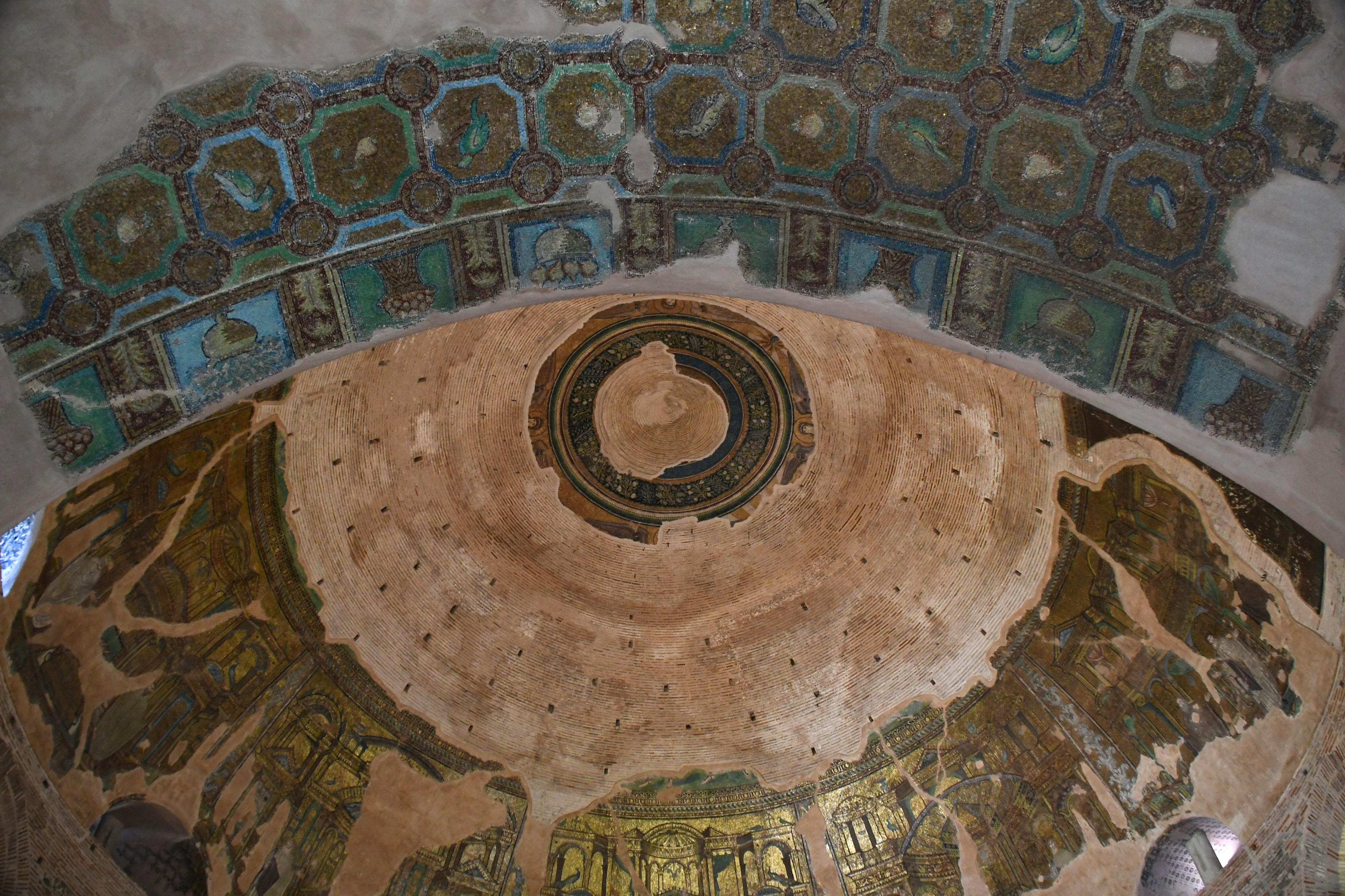 Thessaloniki, Rotunde des Galerius, Georgsrotunde (Ροτόντα, Άγιος Γεώργιος) (306 A.D.)